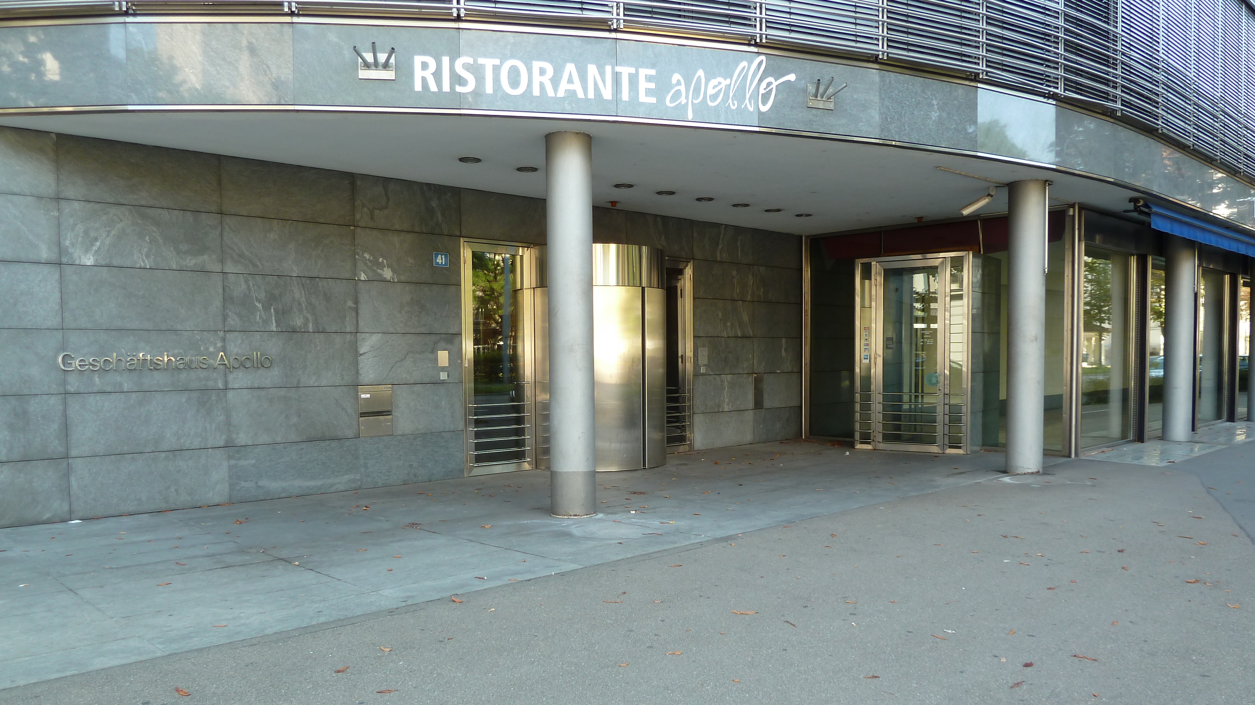 Ristorante Apollo im Geschäftshaus Apollo